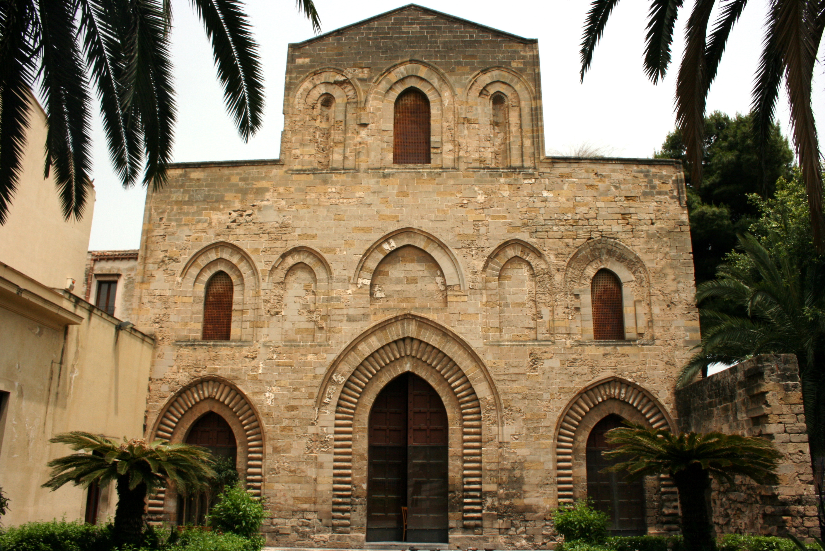 Chiesa della magione o della ss trinita (Palermo)